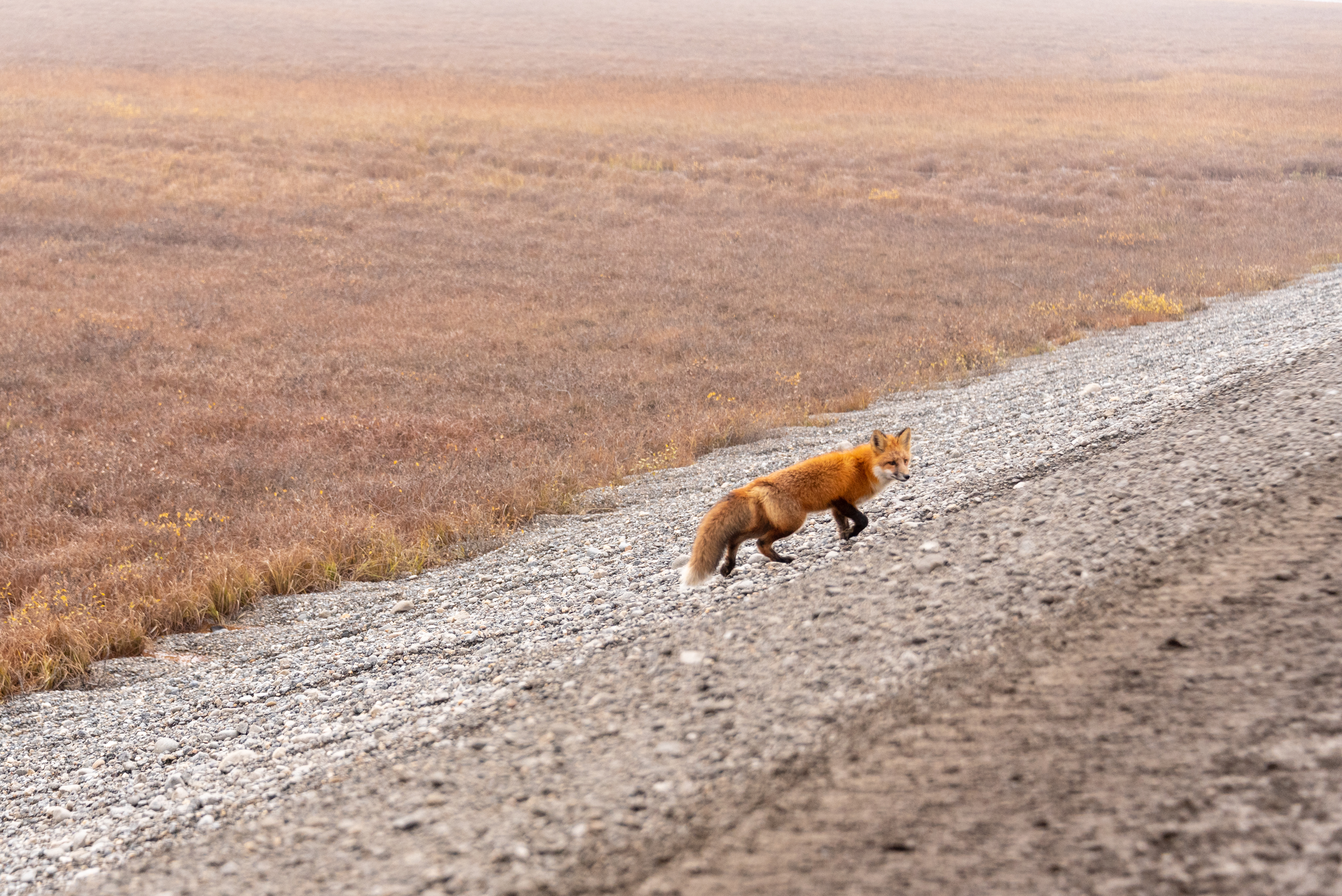 அமெரிக்காவின் அலாஸ்கா மாகாணத்தில் காணும் சிகப்பு நரி வகை.